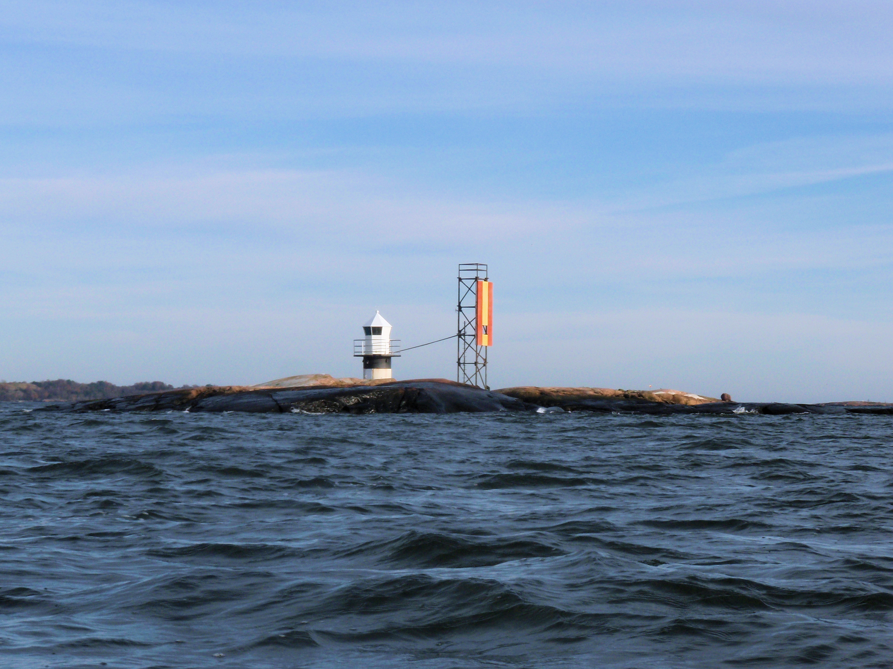 Koirakari-niminen saari Helsingin edustalla